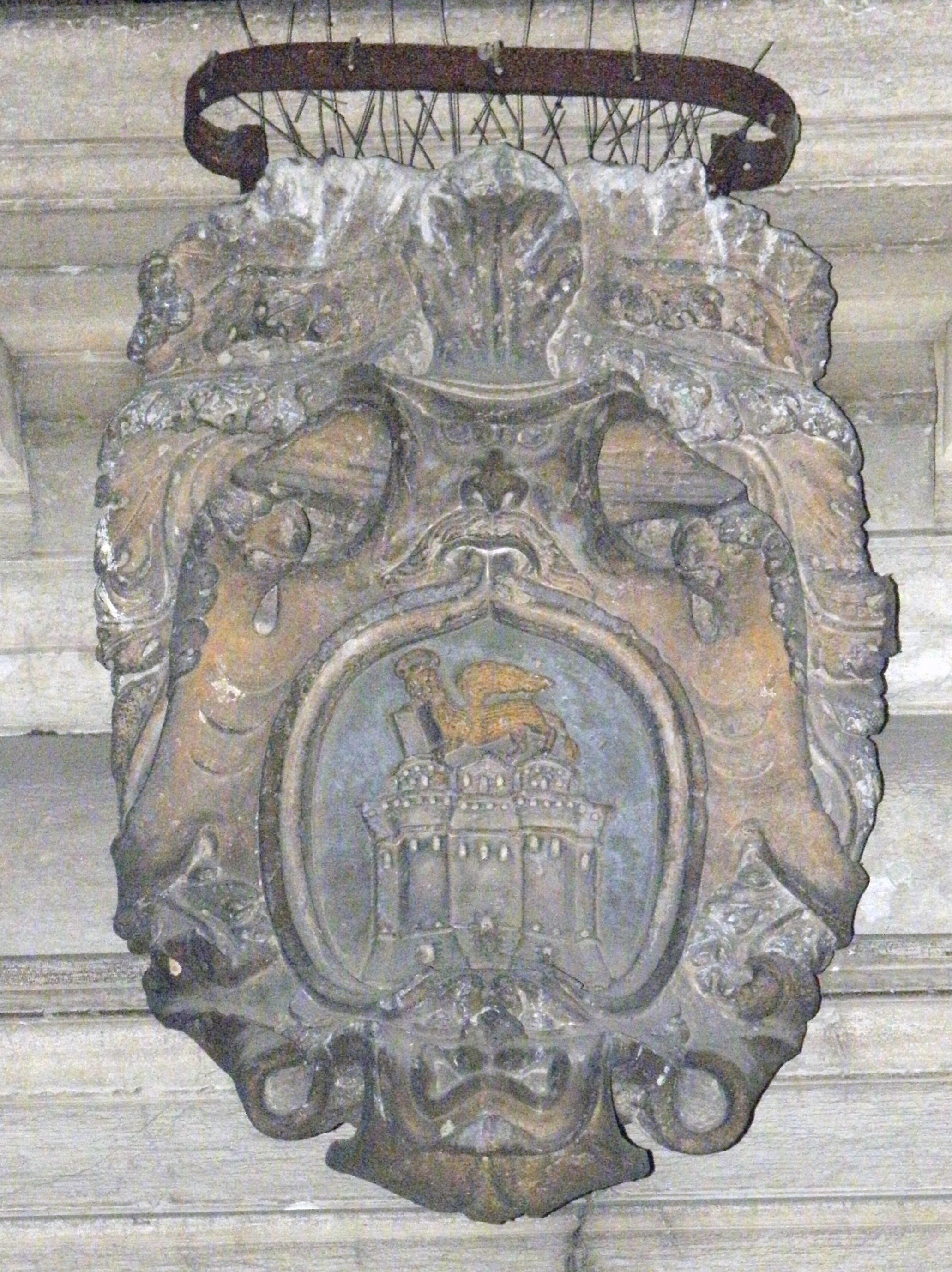 Rovigo, Chiesa della Beata Vergine del Soccorso: stemma della città, nell'aspetto del periodo della Repubblica Veneta, presente sul portale principale.